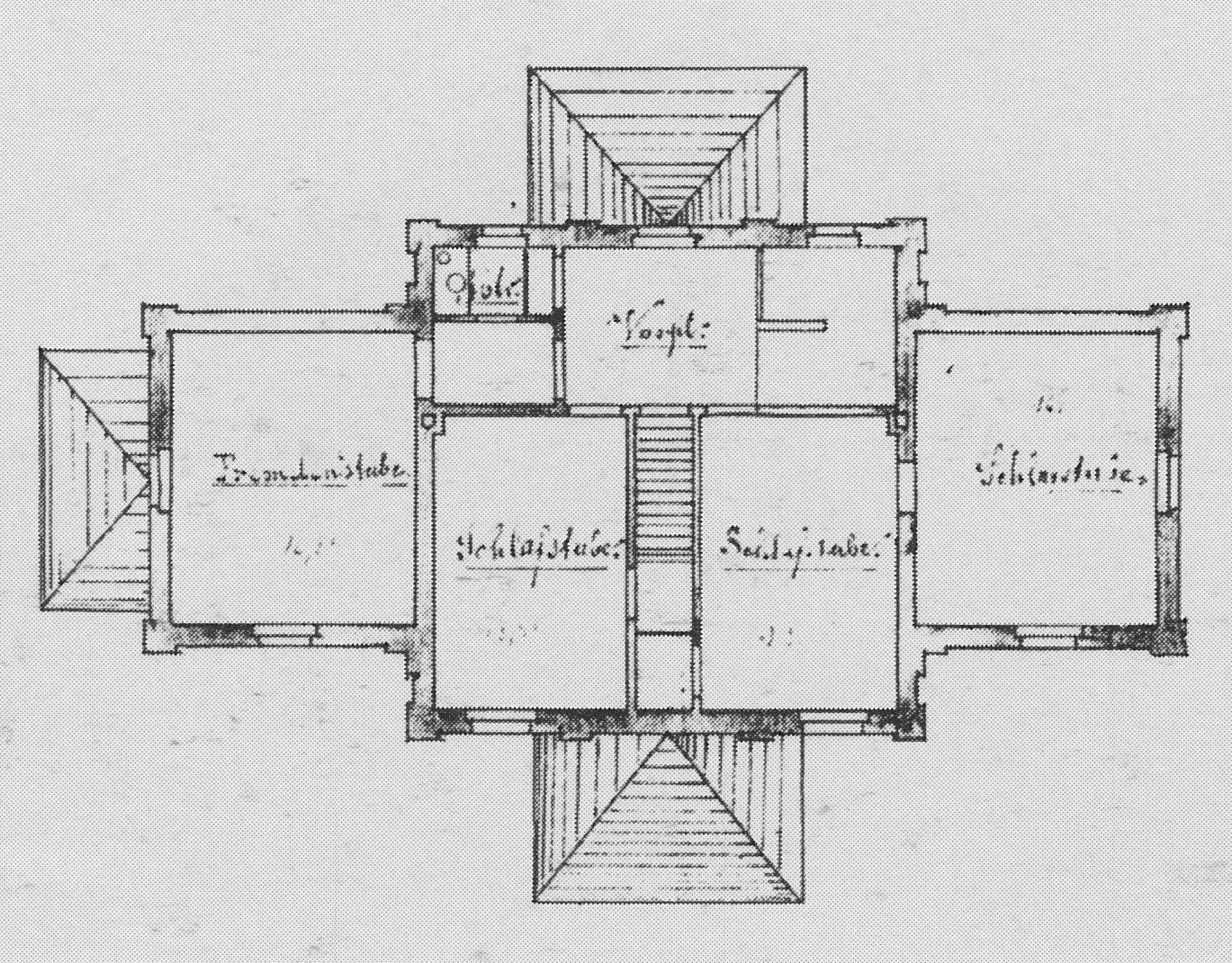 Radebeul Ludwig-Richter-Allee 6 Grundriss 1875